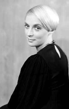 portrett, kvinne, skuespillerinne, sangerinne, sittende halvfigur, turban.